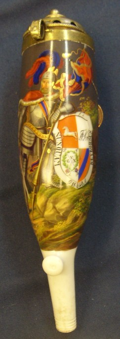 Pfeifenkopf einer Porzellanpfeife mit dem Wappen des Corps Hannovera Göttingen aus dem Jahr 1846.